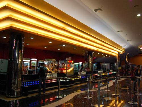 Bomboniére do Multiplex Pantanal Cuiabá, da Cinematográfica Araújo